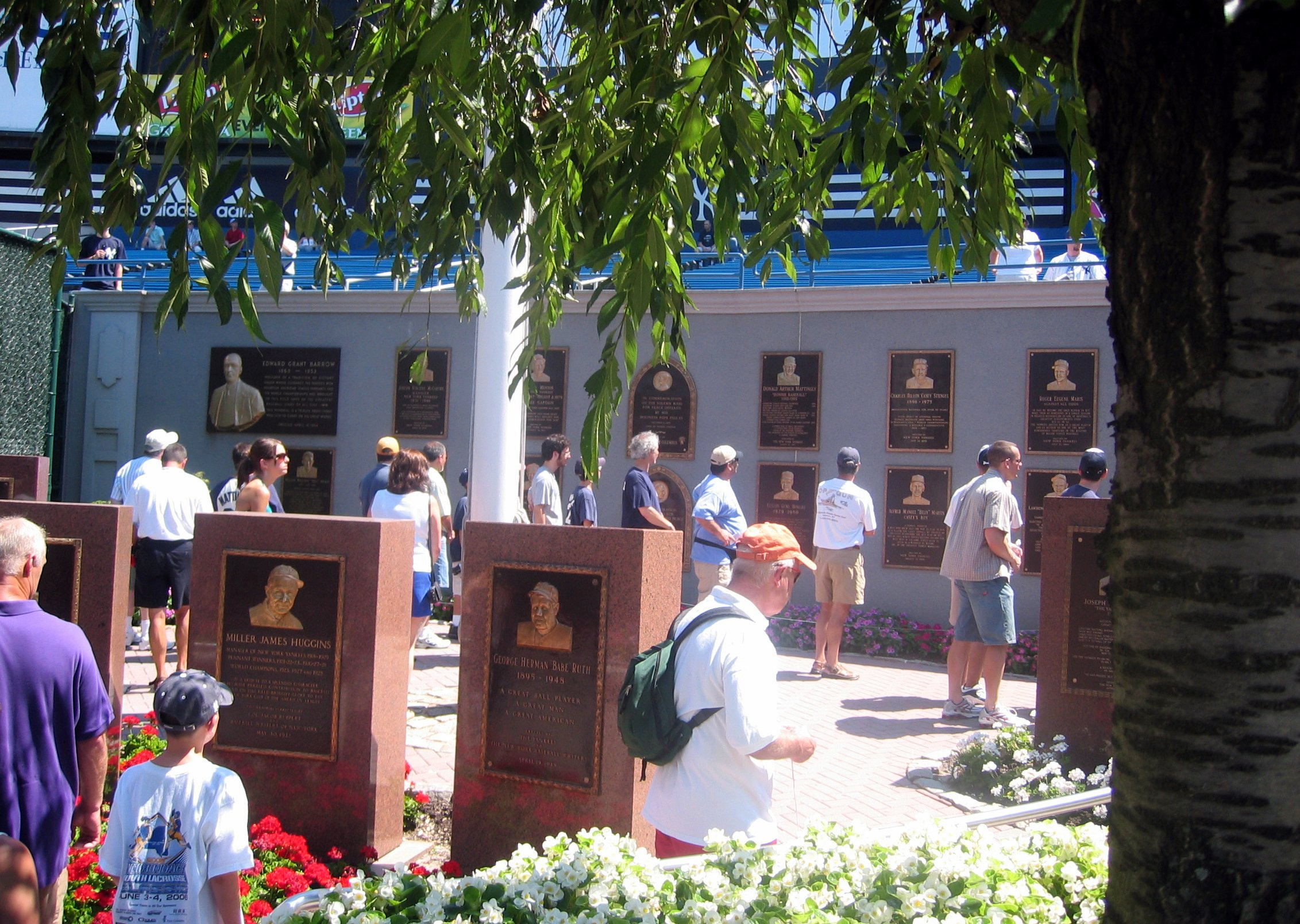 Yankee Stadium Monument Park